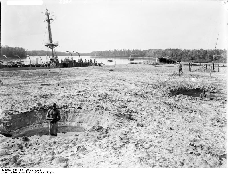 Krater, Granatloch